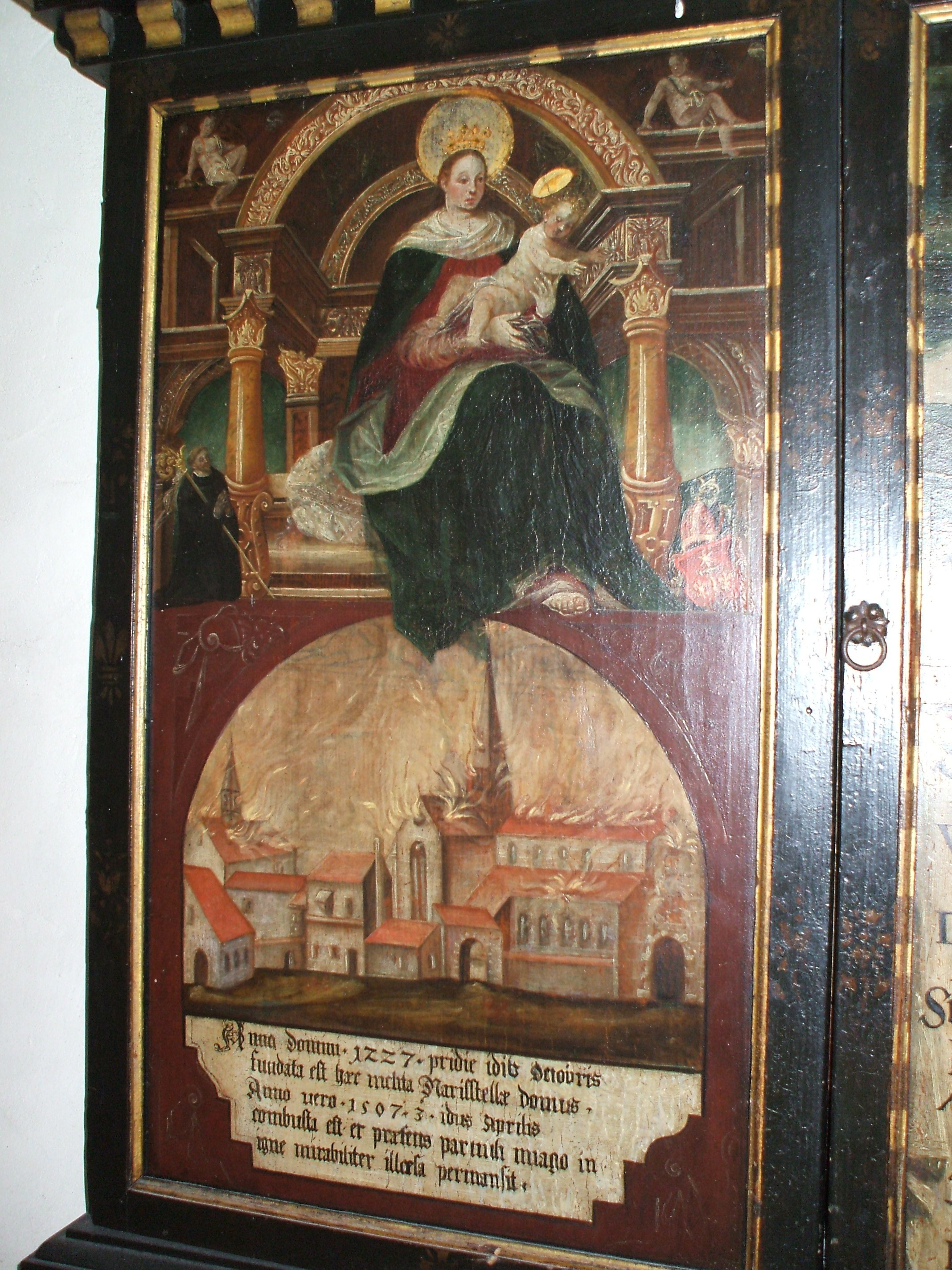 Darstellung des Klosterbrands 1507 auf der linken Aussenseite des Flügelaltars in der Kreuzgangkapelle des Klosters Wettingen.